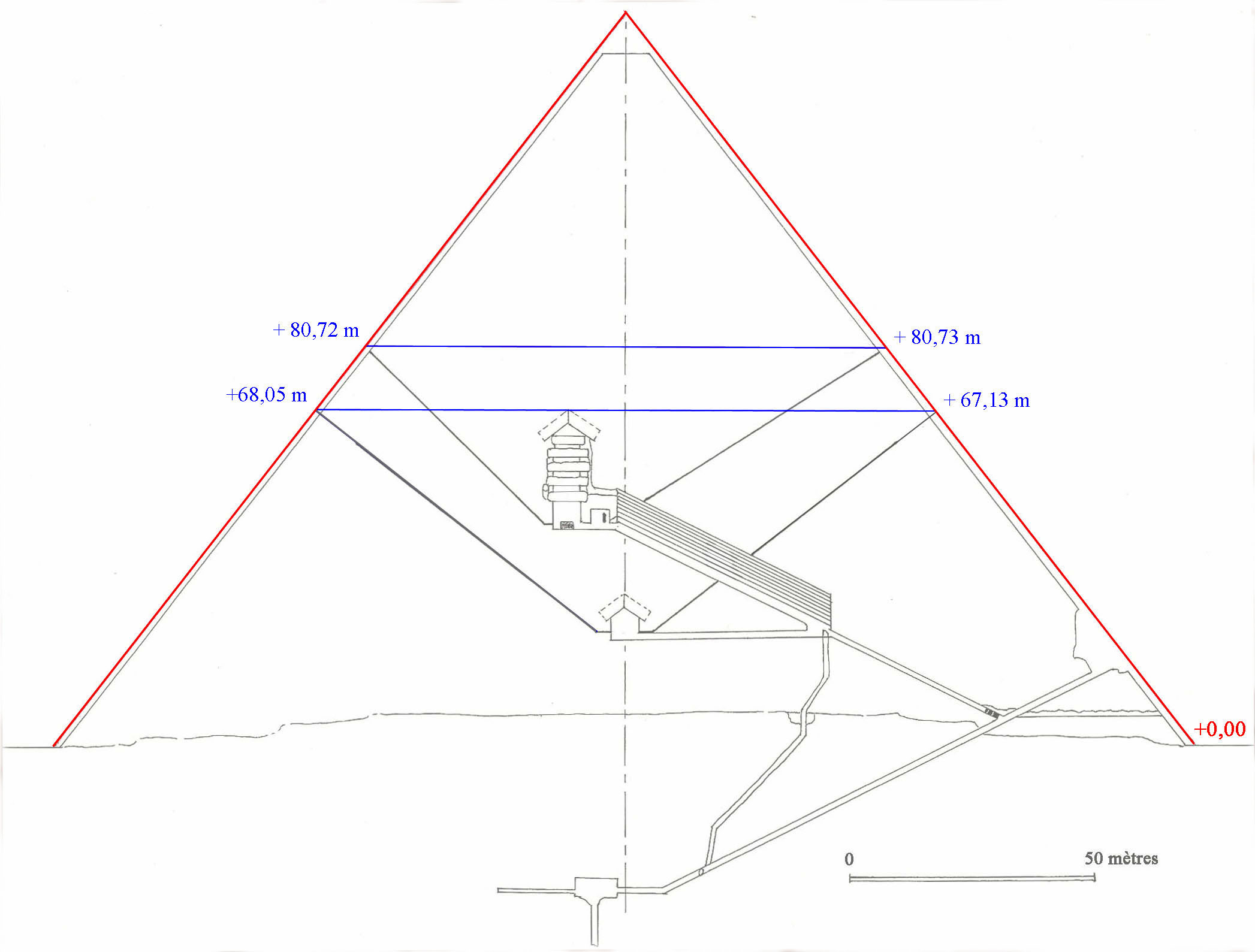 géométrie des conduits de ventilation